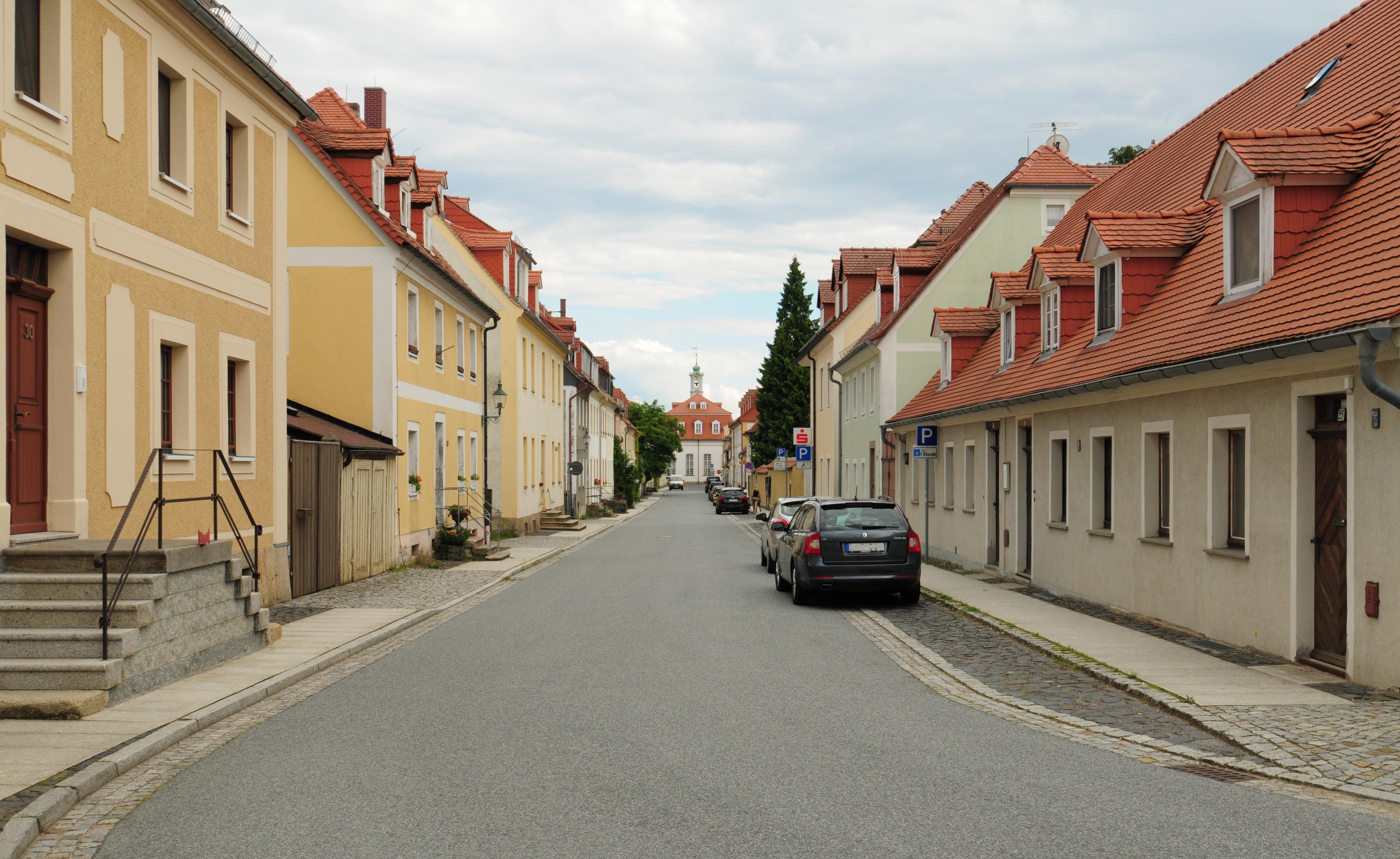 Herrnhut, August-Bebel-Straße (Landkreis Görlitz, Sachsen, Deutschland)